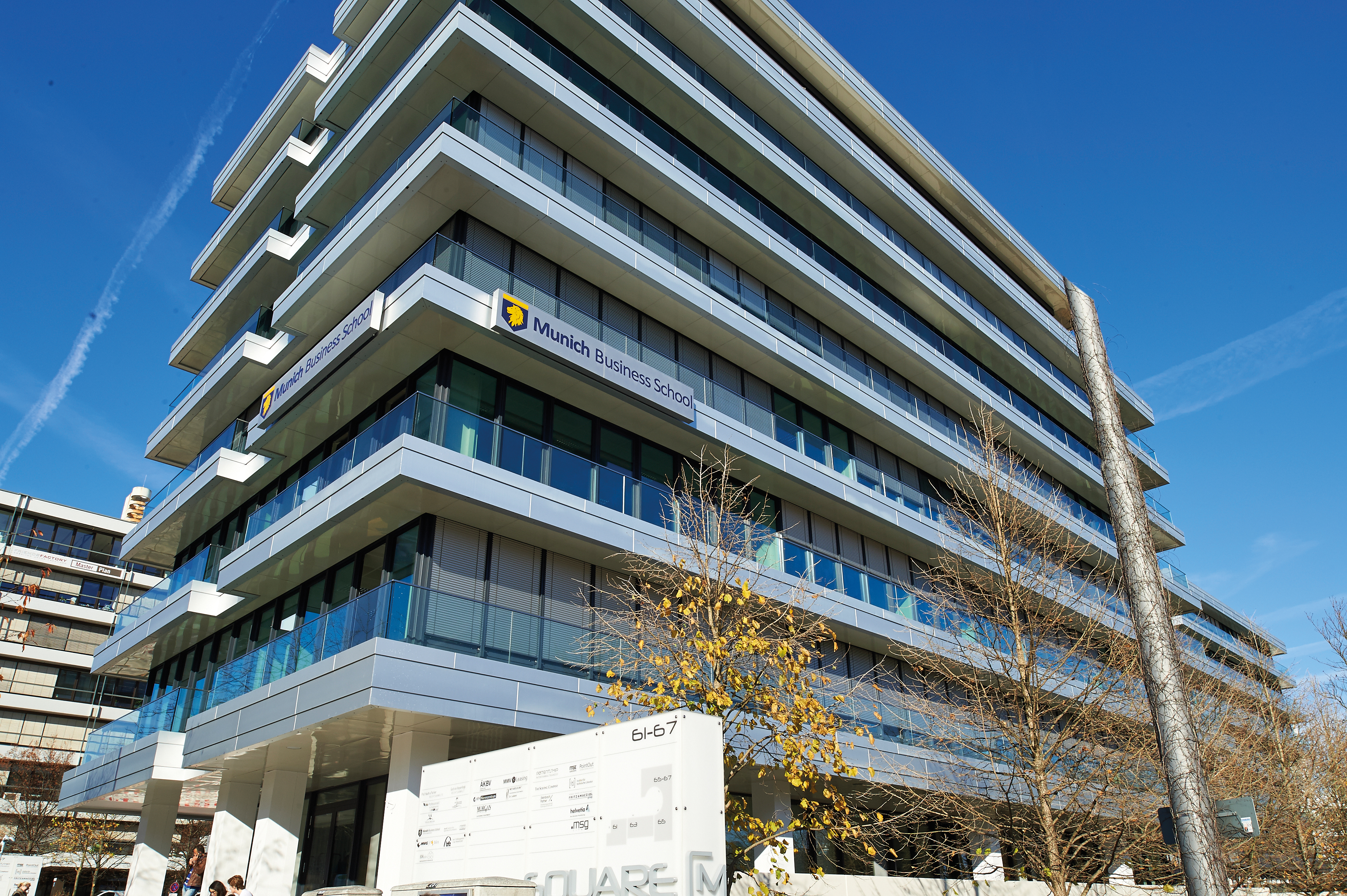 Gebäude der Munich Business School in der Elsenheimerstraße in München, 2015